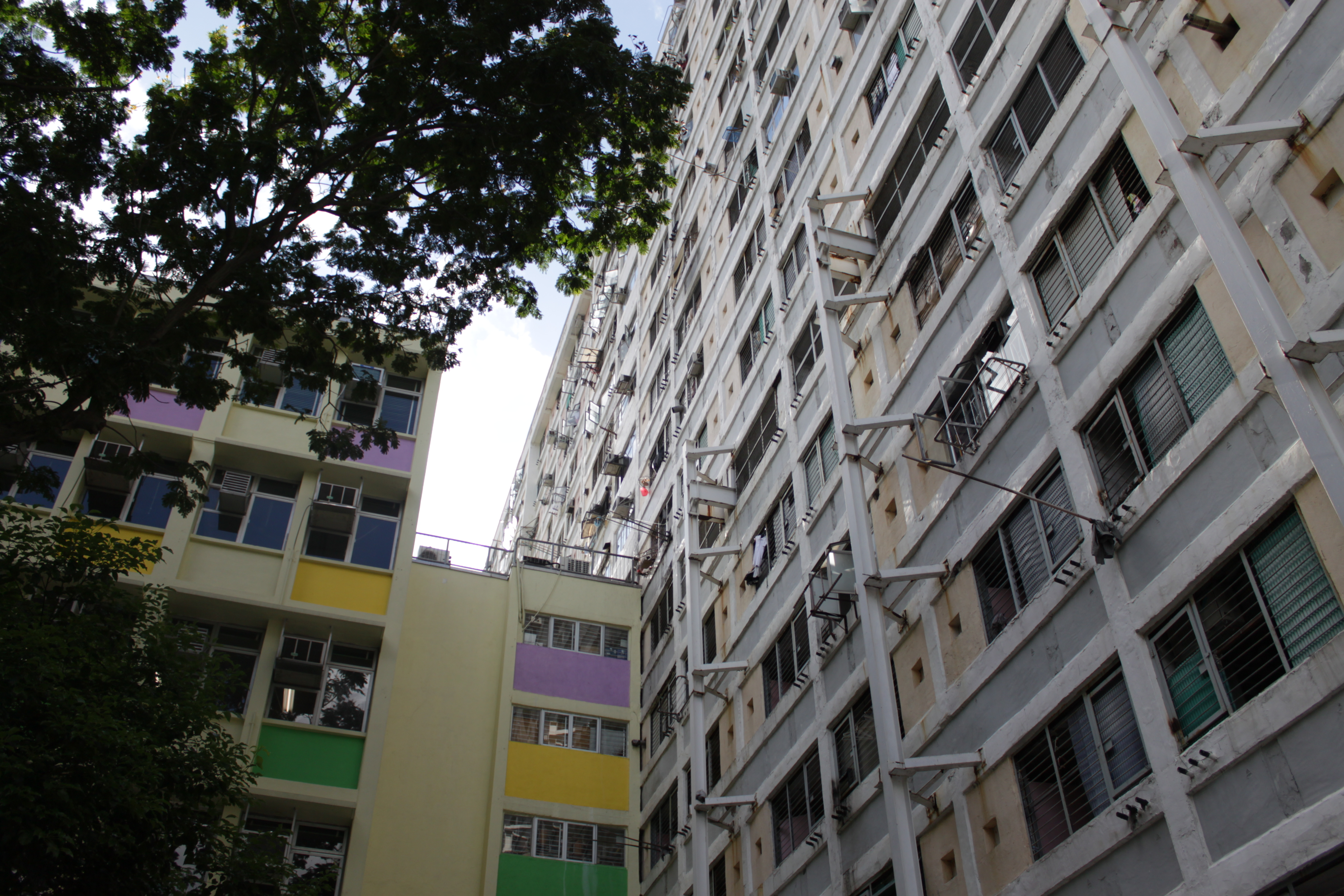 Tung Tau Estate Block 22